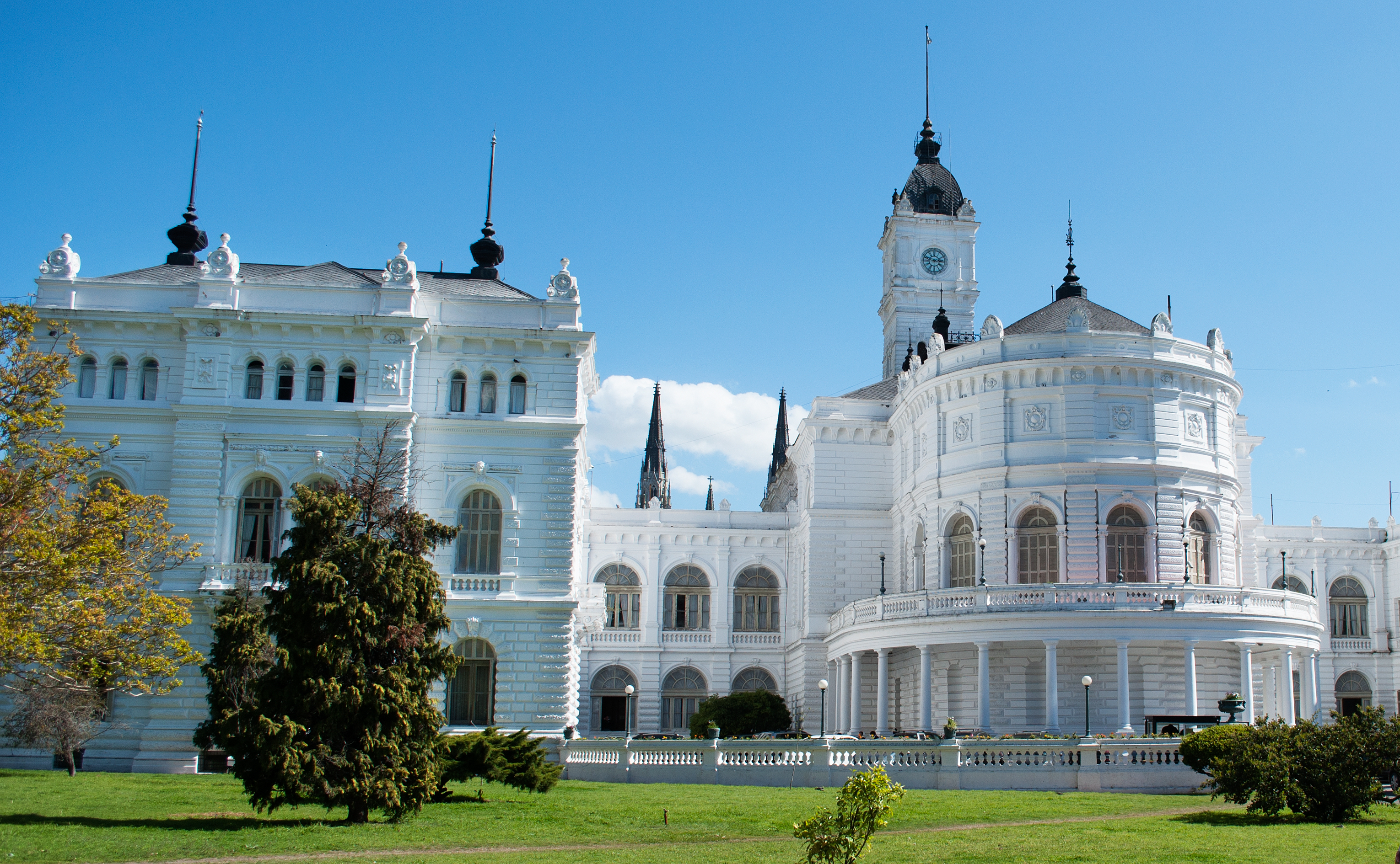 Parte trasera de la Municipalidad. Las torres que se ven detrás pertenecen a la Catedral